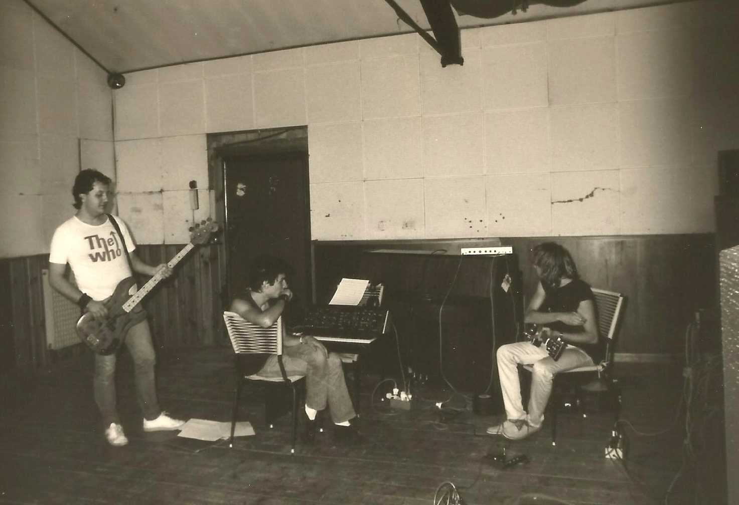 Uniplux al Cenacolo 1981